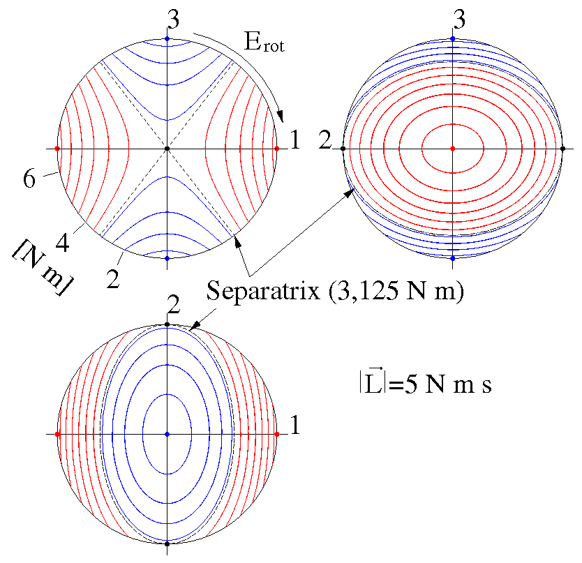 Trägerkurven der Lösungen der Kreiselgleichungen mit I1=2 kg m², I2=4 kg m² und I3=10 kg m². Die Kurven gleicher Rotationsenergie sind mit Werten 1,5...6 N m in 0,5 N m Schritten bei einem Drehimpuls | L → | {\displaystyle |{\vec {L |} =5 N m s gezeichnet.